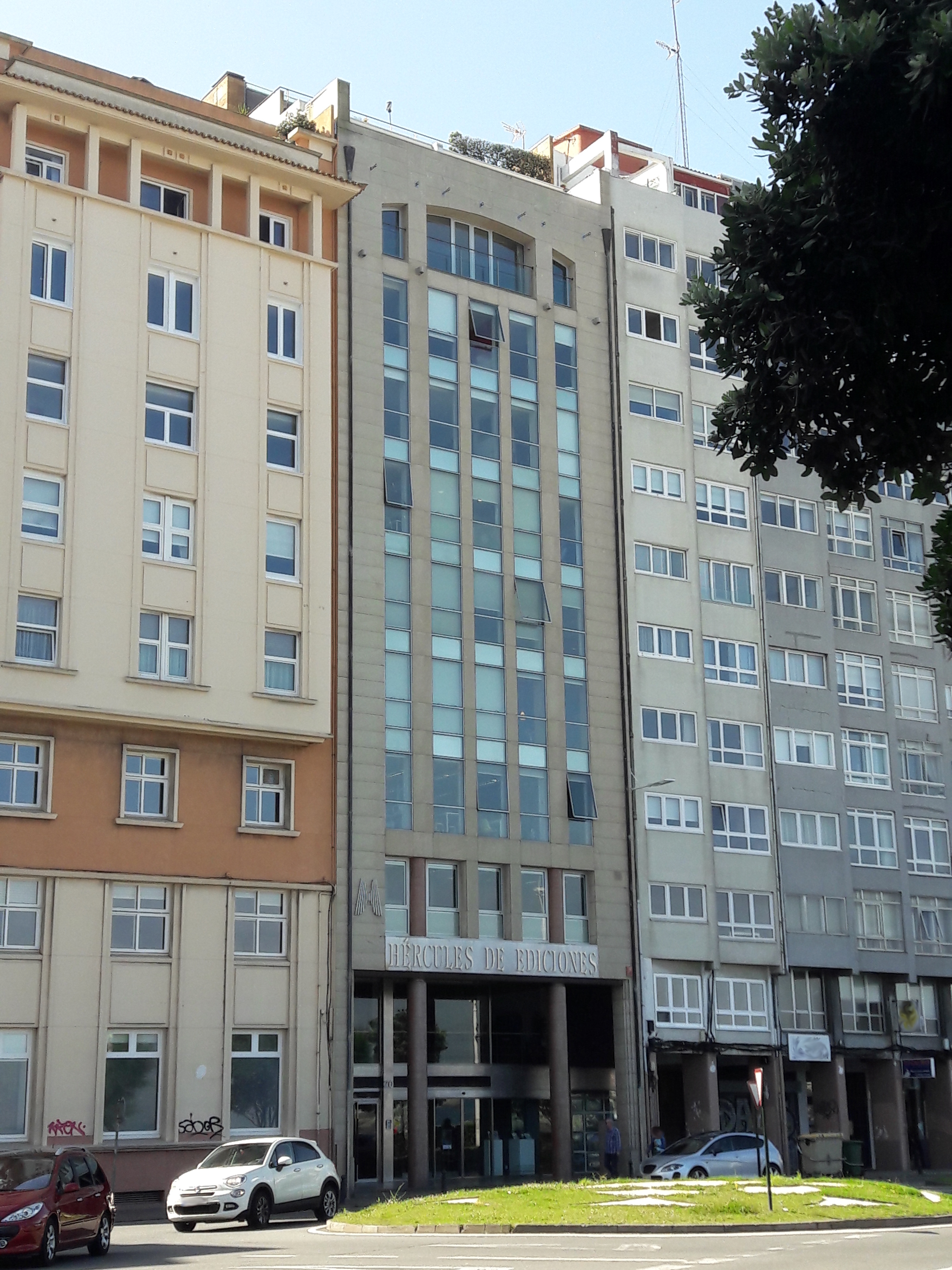 Sede da editorial Hércules de Ediciones na Coruña